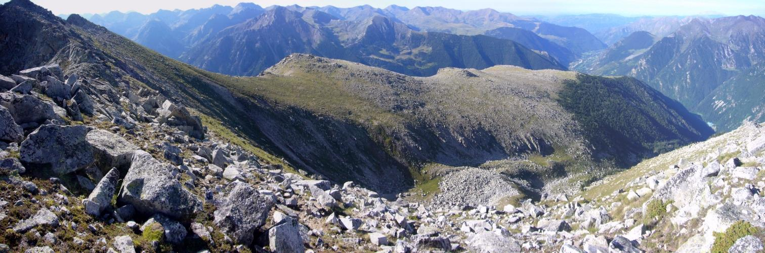 Vall de Comaltes, vista des del Pic de Comaltes; la Vall de Boí, Alta Ribagorça, Catalunya